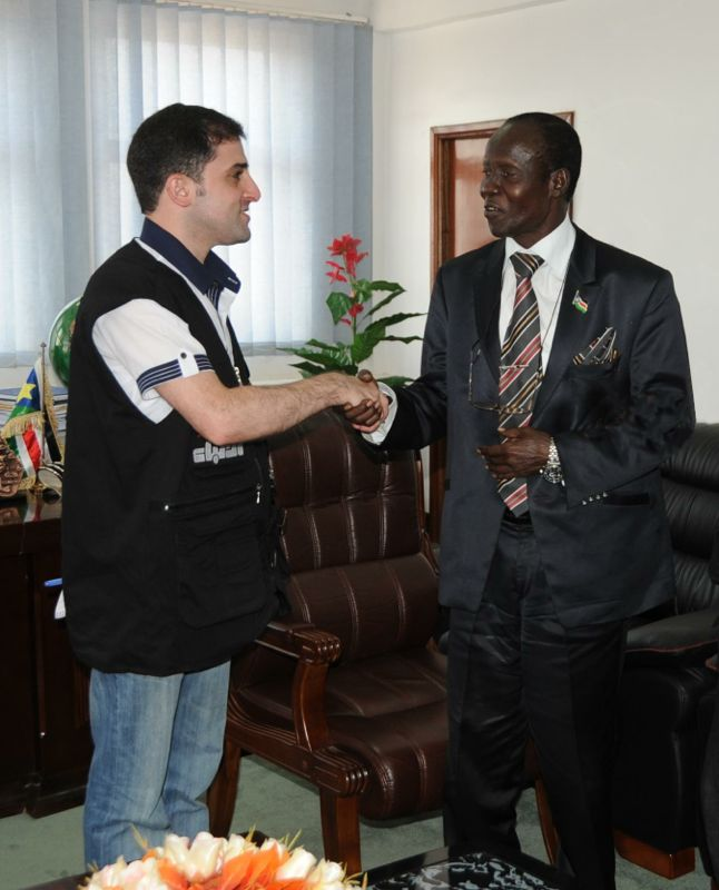 مع رئيس برلمان جنوب السودان جيمس ايقا في جوبا